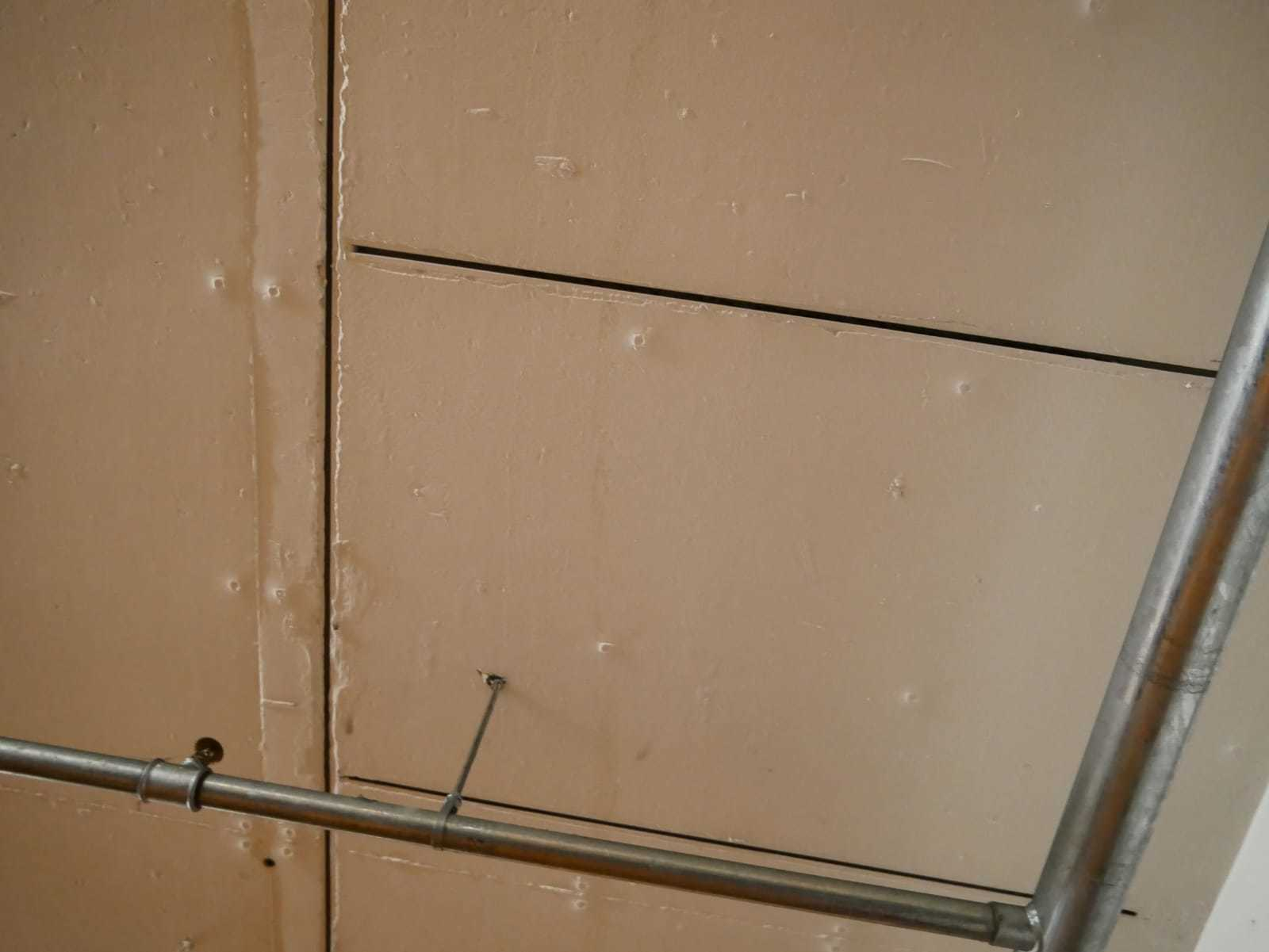 Die Befestigungsschienen für die Plastikvorhänge der Klosettkabinen.